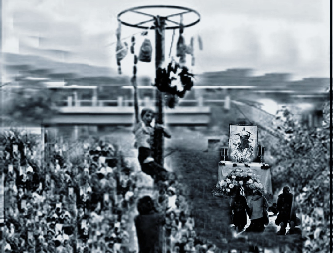 Foto di Santa Maria Assunta Nizza di Sicilia